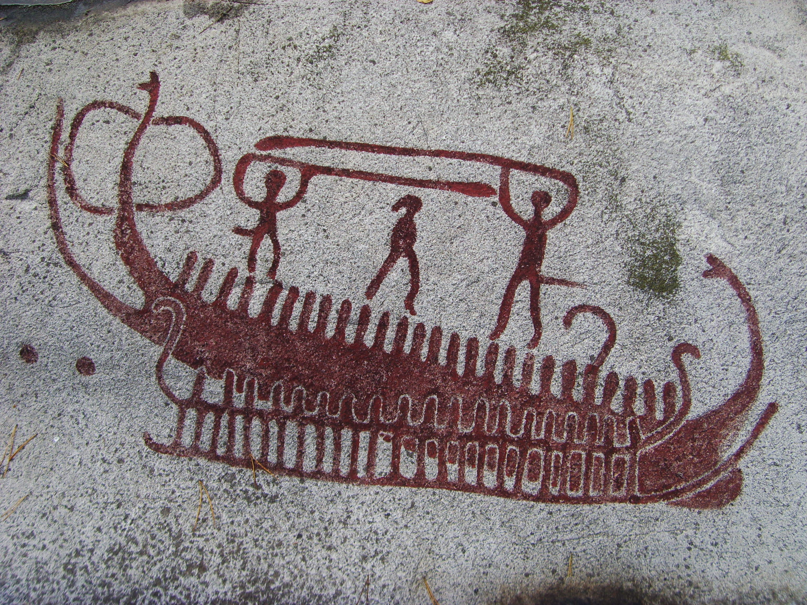 Masslebergs fornlämningsområde i Strömstads kommun, med en megalitgrav med skålgropar på takhällen, två hällristningsytor och ett järnåldersgravfält. I närheten finns också ryggade åkrar. Bland ristningsmotiven finns en tydlig överhuggning.